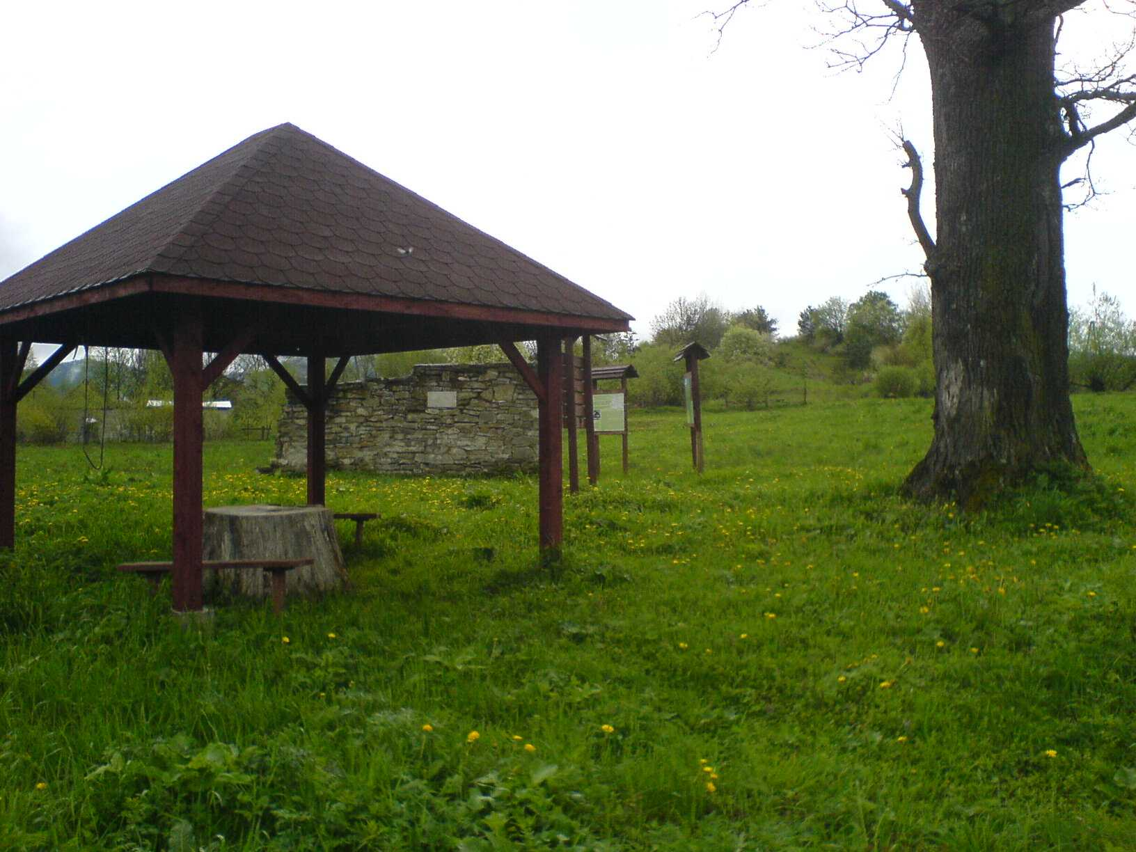 Wincenty Pol w Kalnicy